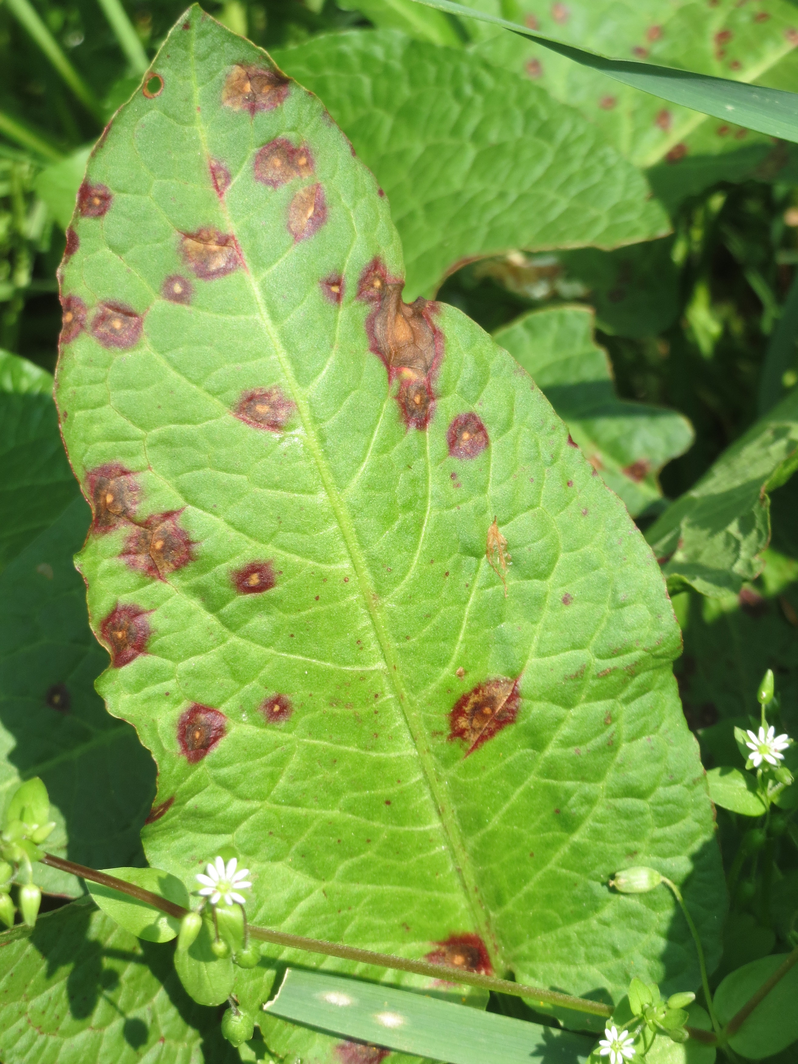 Stumpfblättriger Ampfer (Rumex obtusifolius) auf einem Grünstreifen zwischen Eisenbahnstraße und Am Damm in Hockenheim